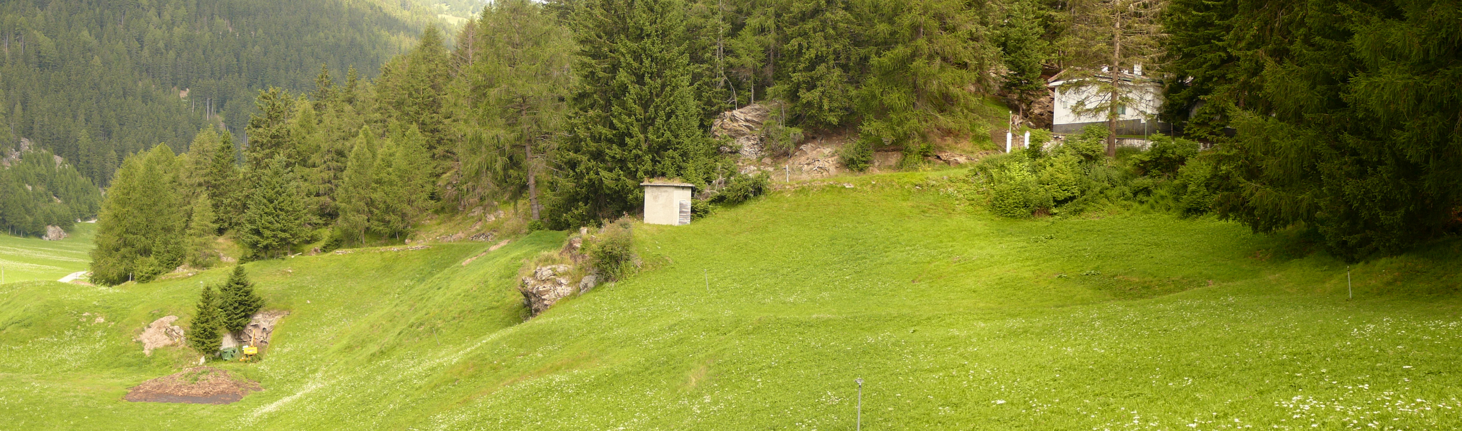 Opera 14, sbarramento Resia